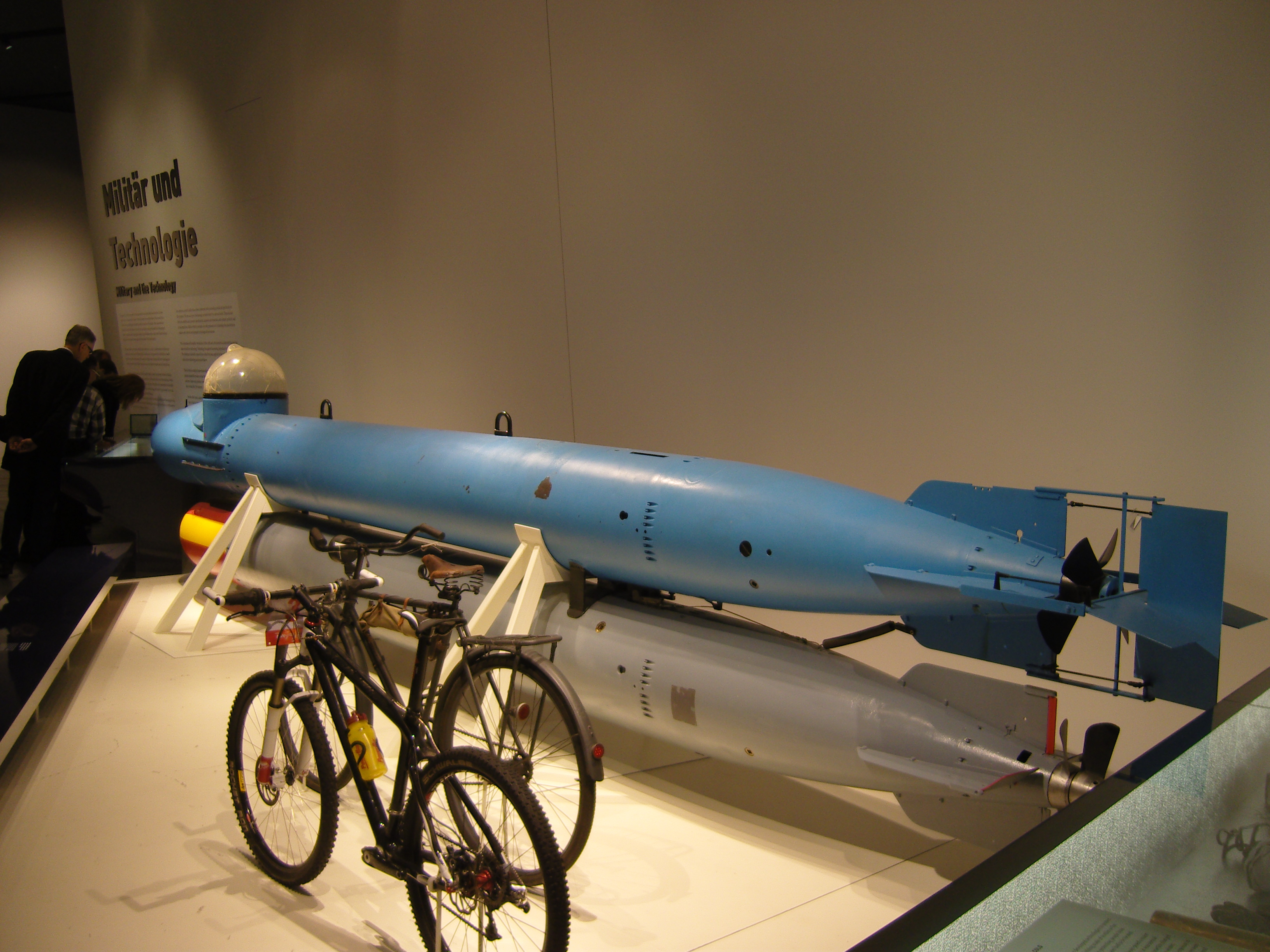 Ein-Mann-Torpedo „Marder“ (Militärhistorisches Museum der Bundeswehr Dresden)